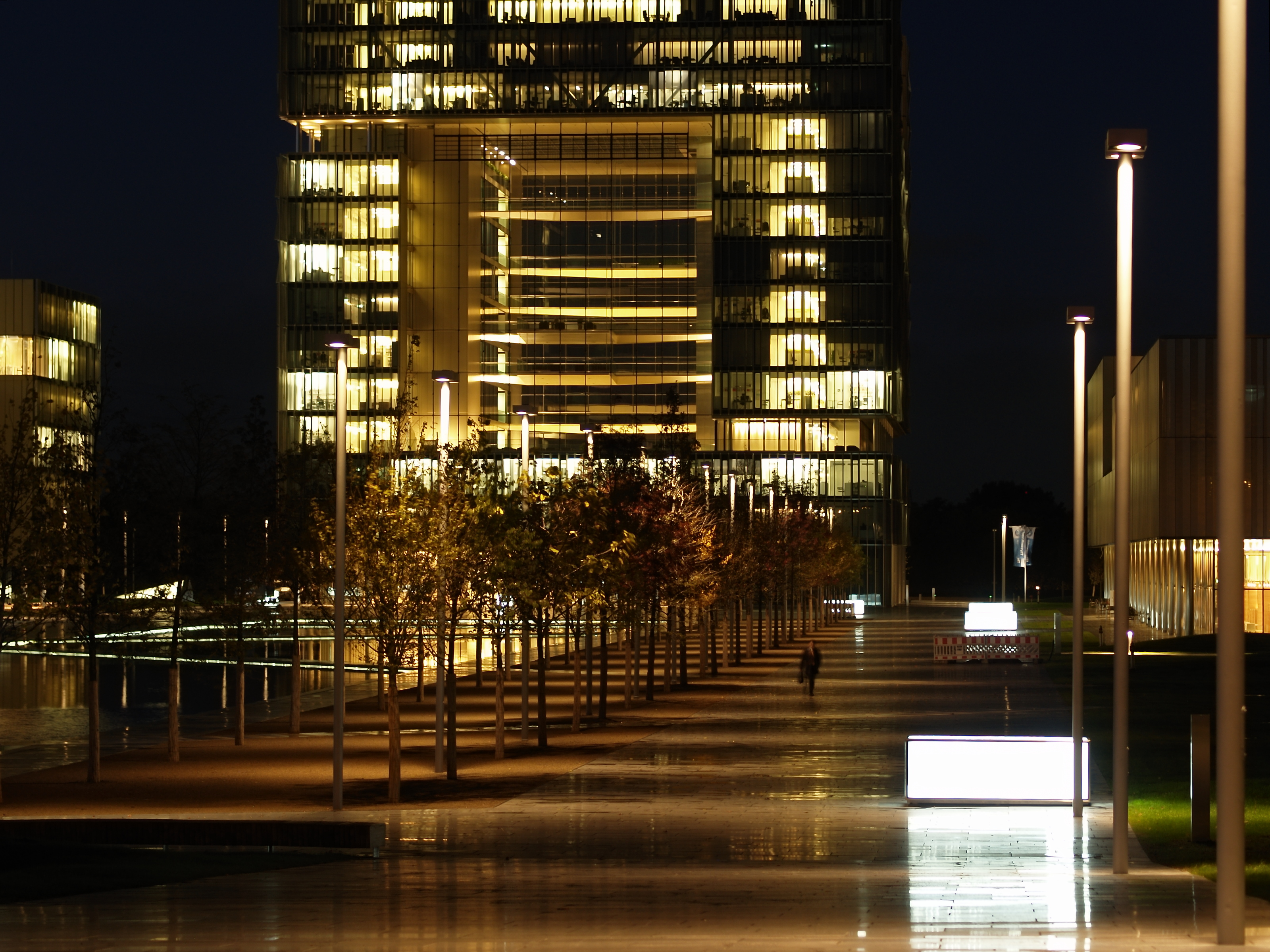 Die neue Konzernzentrale von ThyssenKrupp im Krupp-Gürtel in Essen